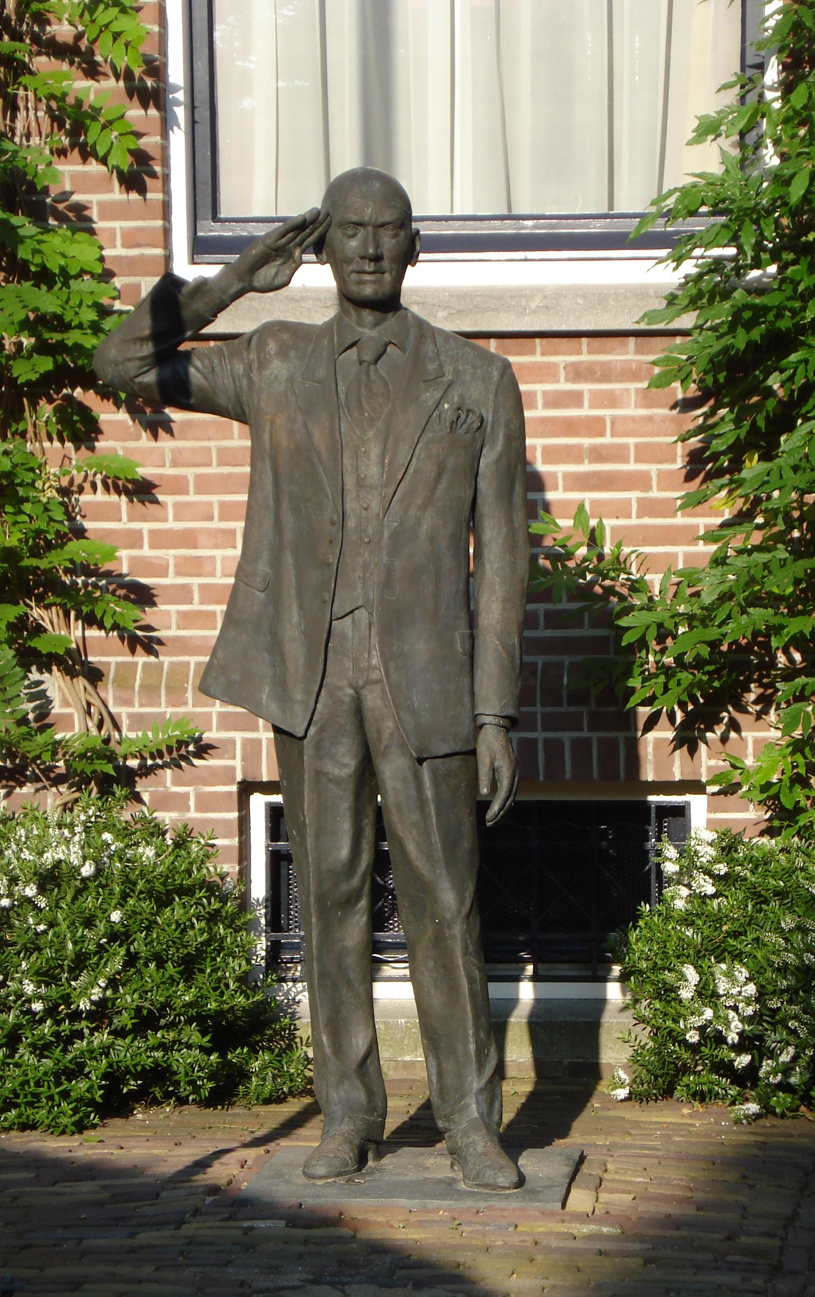 Rotterdam, G.W. Burgerplein. Standbeeld Pim Fortuyn door Daphné du Barry. Rotterdam/The Netherlands.